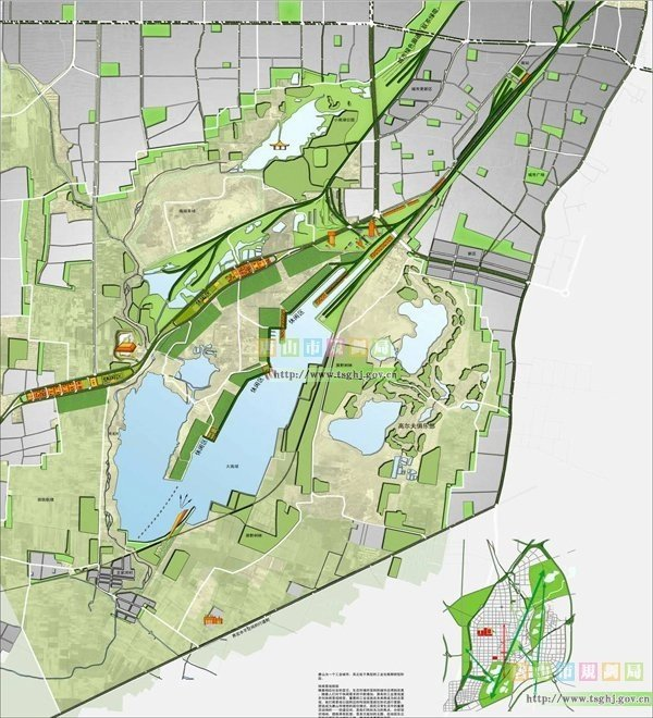 中文（中国大陆）: 2008年的唐山南湖规划